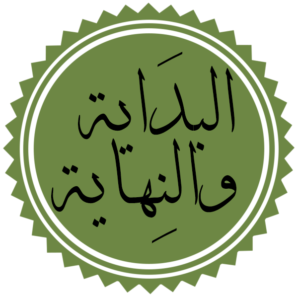 تخطيط لعنوان كتاب البداية والنهاية لابن كثير